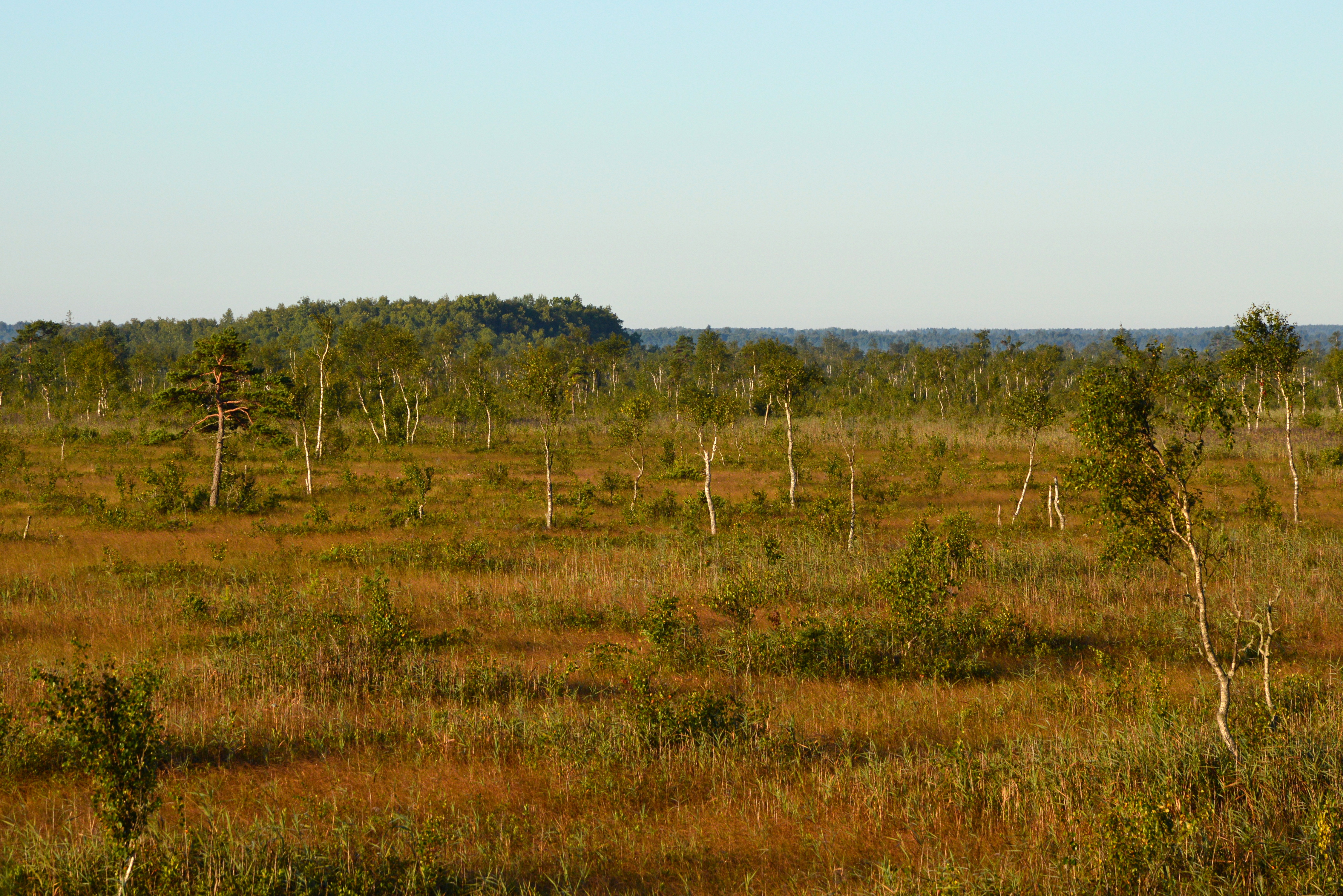 Avaste soo